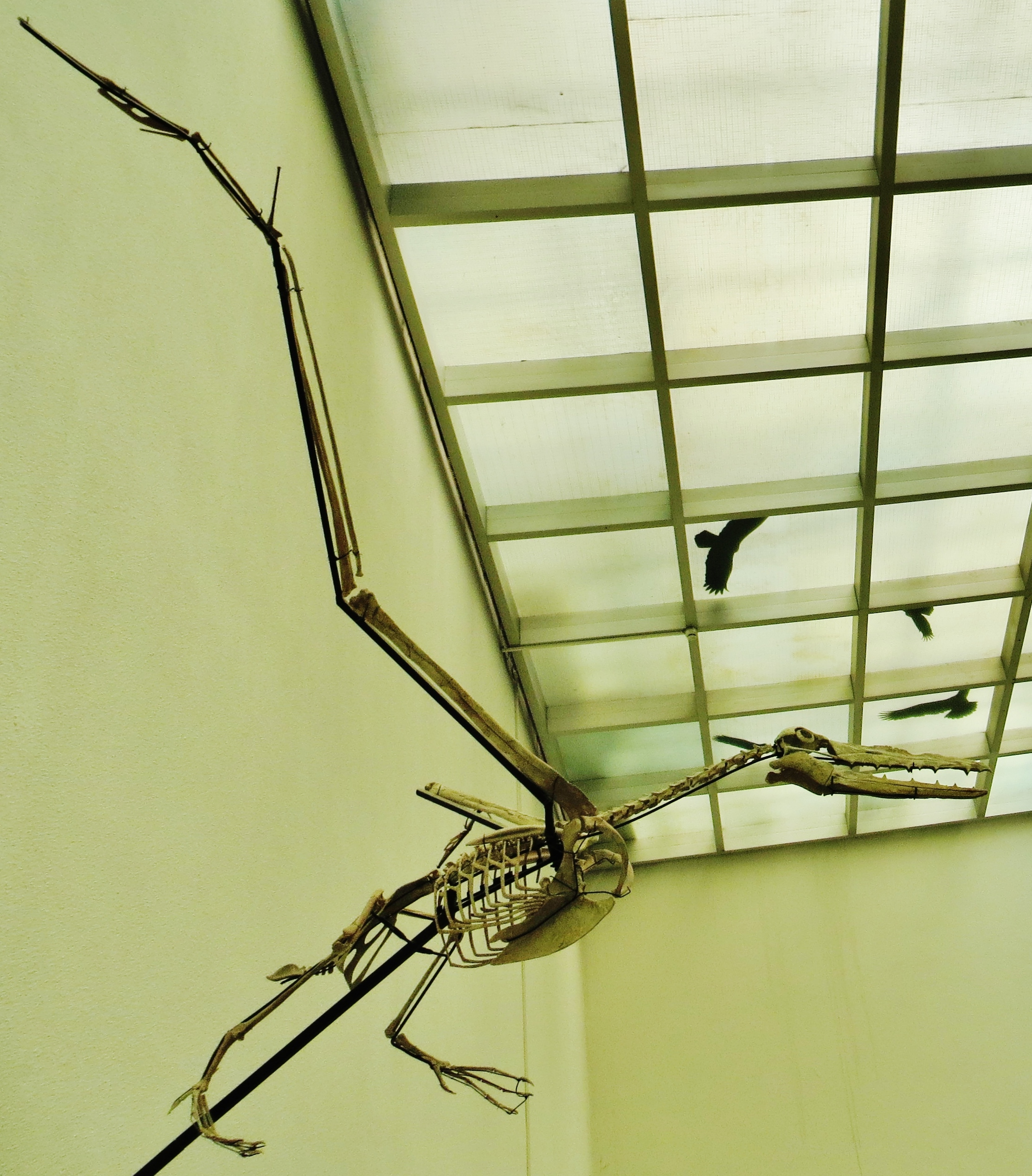 Fossil - Took the picture at Natural History Museum, Karlsruhe